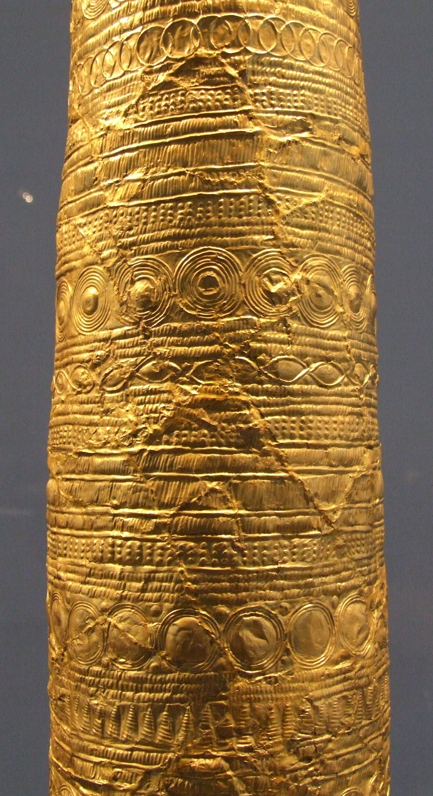 Goldblechkegel von Ezelsdorf-Buch - 3 - unterer Teil des Schaftes, Germanisches Nationalmuseum ( Nürnberg / Deutschland ), Urnenfelder Kultur, 11.-9.Jhdt. v.Chr. - Detail.